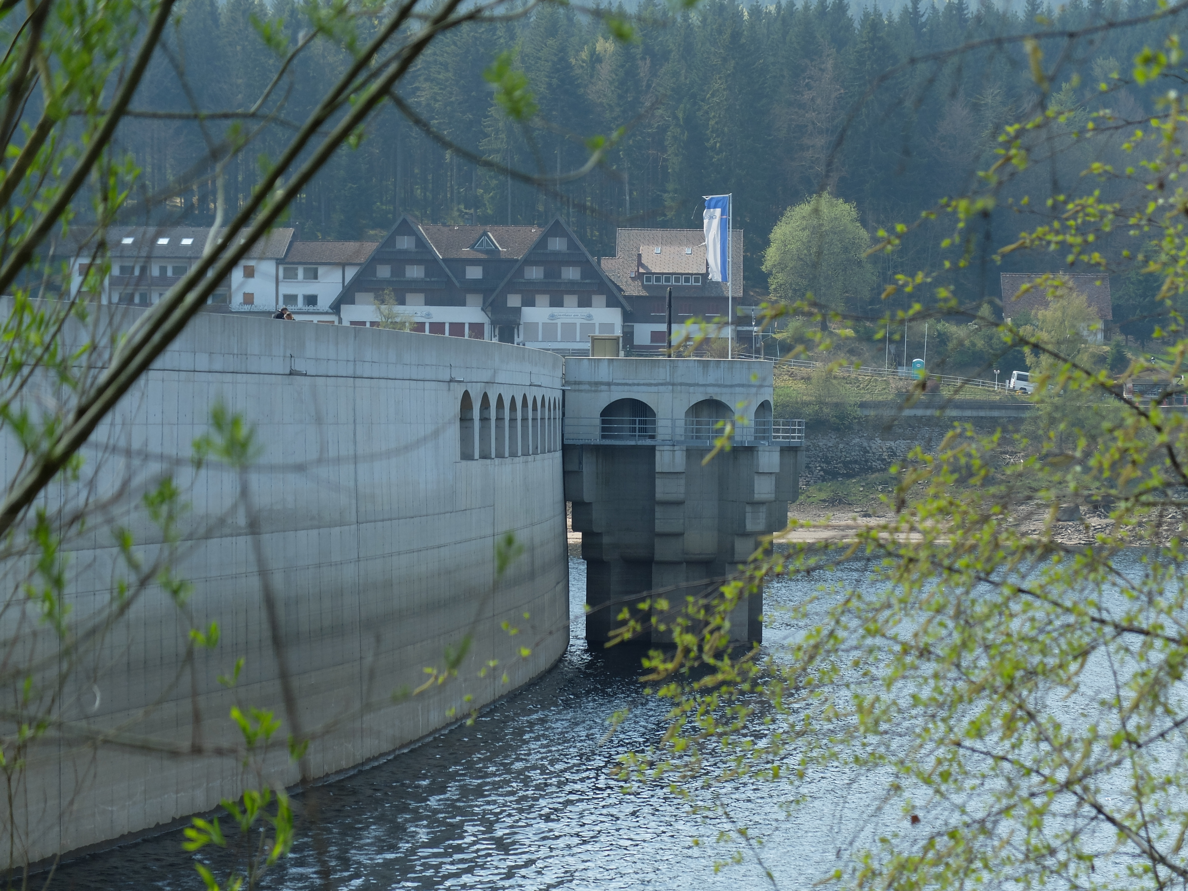 Schwarzenbachtalsperre bei Forbach im Nordschwarzwald